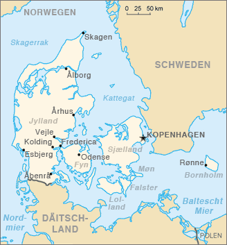 Kaart vun Dänemark